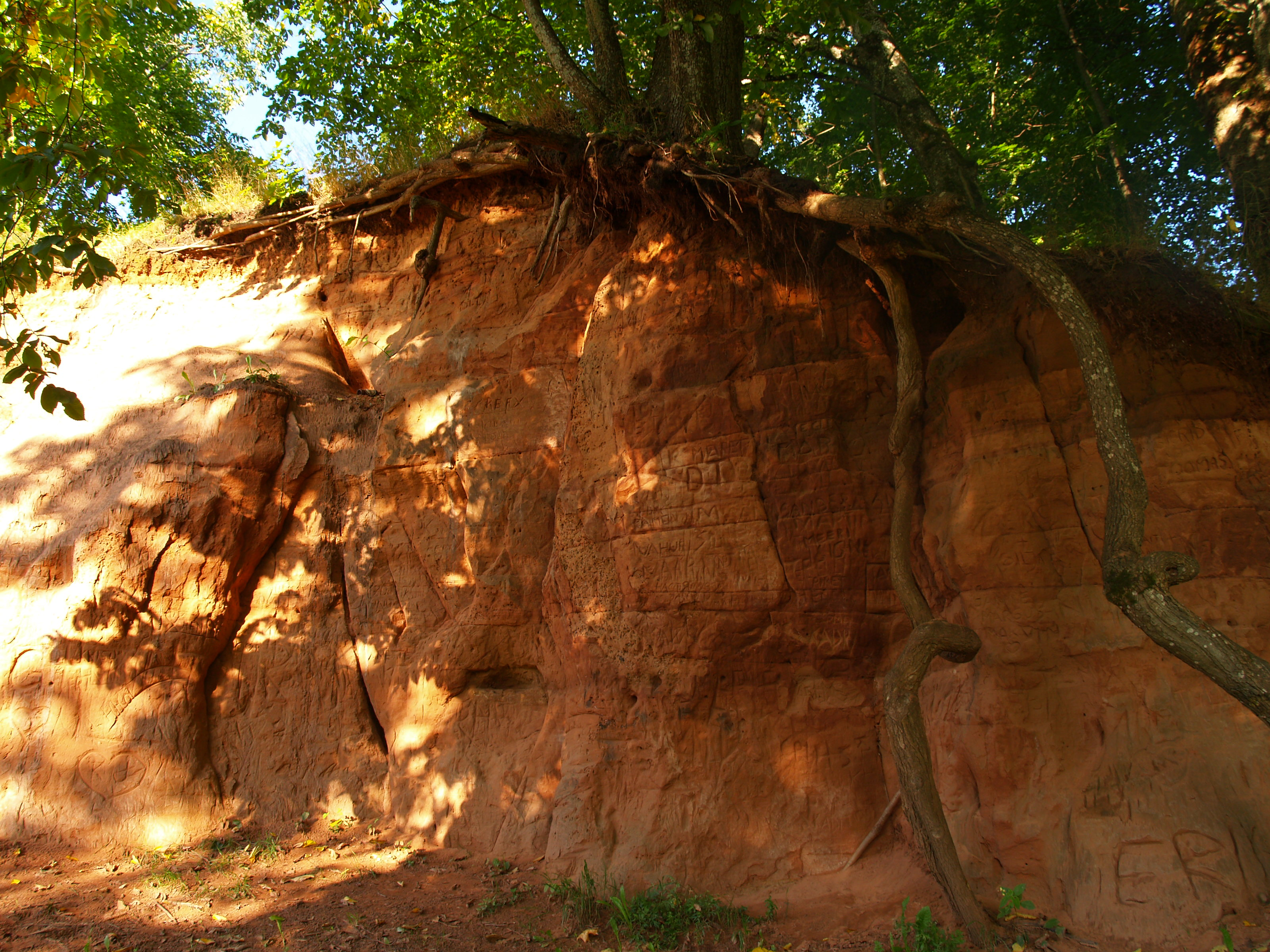 Lossimägede paljand Viljandis